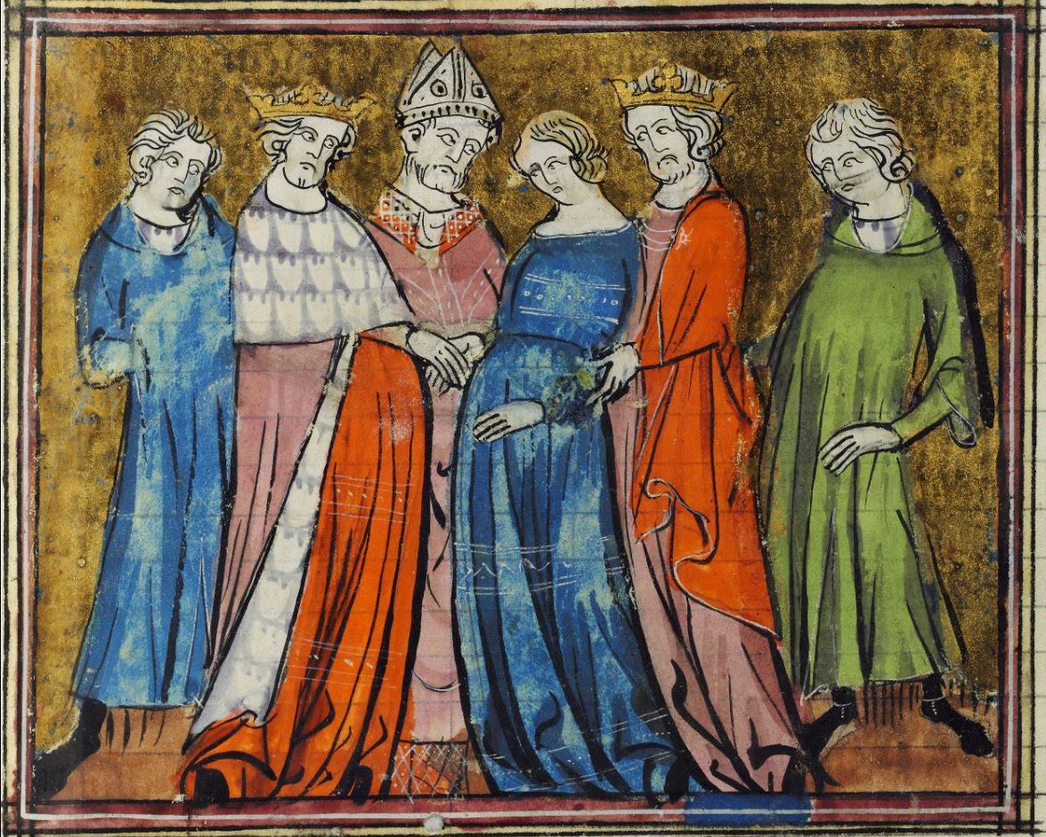 MAÎTRE DU ROMAN DE FAUVEL, Fiançailles d'Arthur et Guenièvre par l'évêque de Thoraise, Paris, entre 1325-50, enluminure in Vita Merlini, BNF, Manuscrits, Français 105